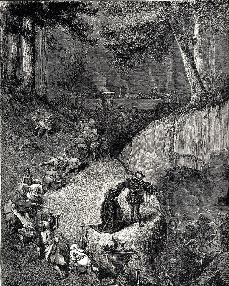 Illustration for Charles Perrault's Riquet à la Houppe from Histoires ou Contes du Temps passé: Les Contes de ma Mère l'Oye(1697). Gustave Doré's illustrations appear in an 1867 edition entitled Les Contes de Perrault. This is the only plate by Doré for this story